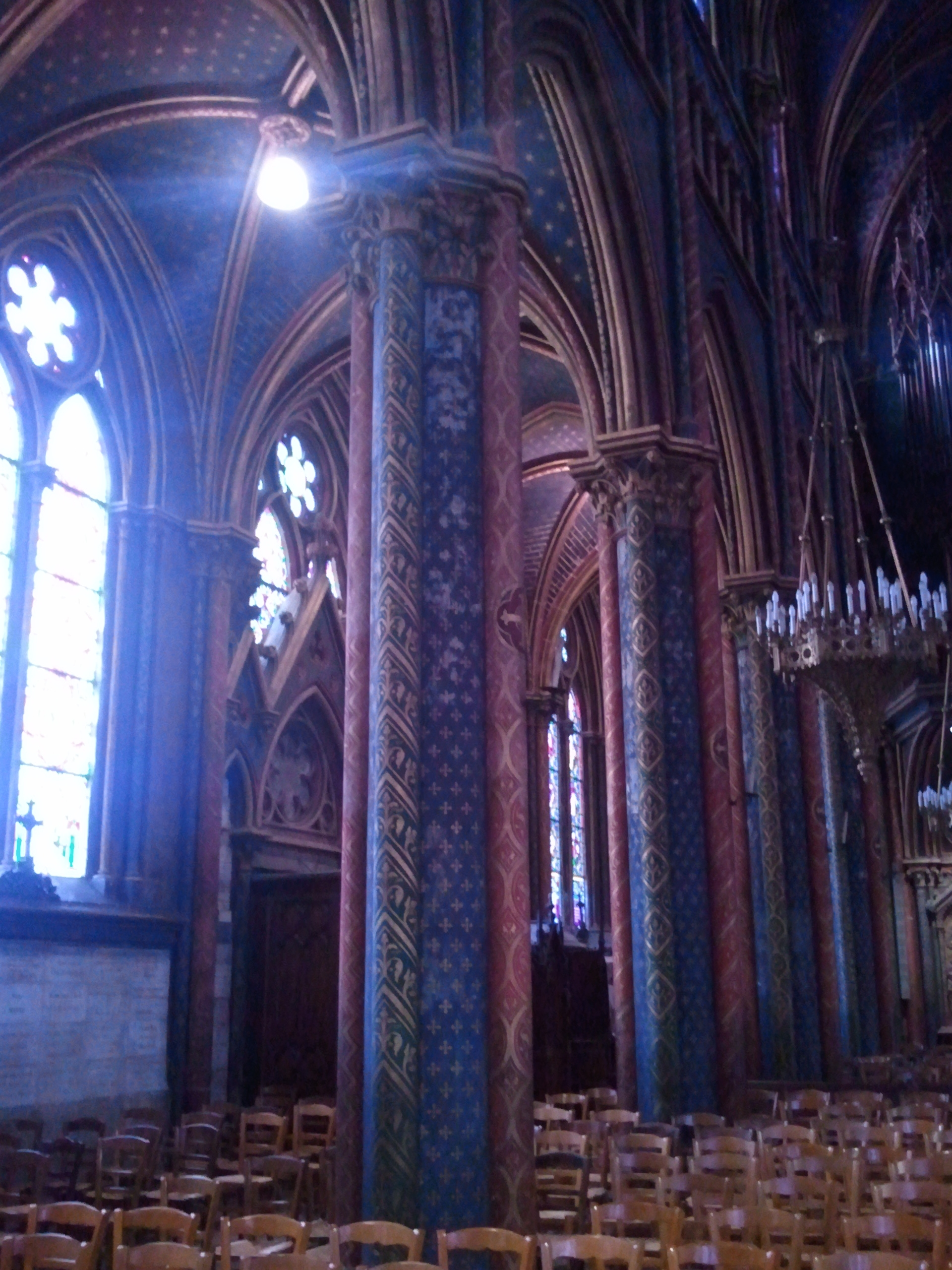 Détail d'une colonne peinte de la Basilique Notre-Dame de Bonsecours. BONSECOURS, Seine-Maritime (76), France